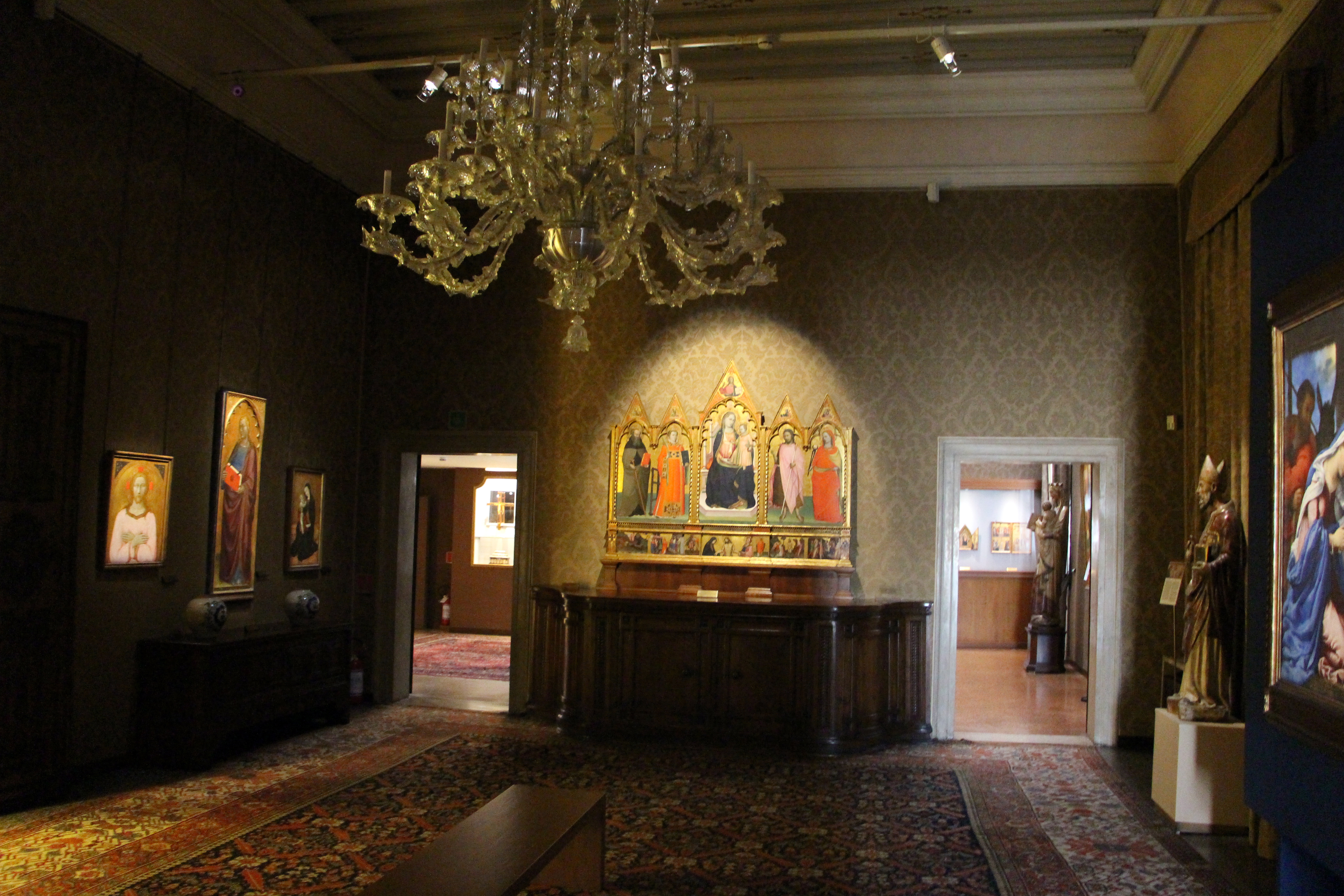 Venezia